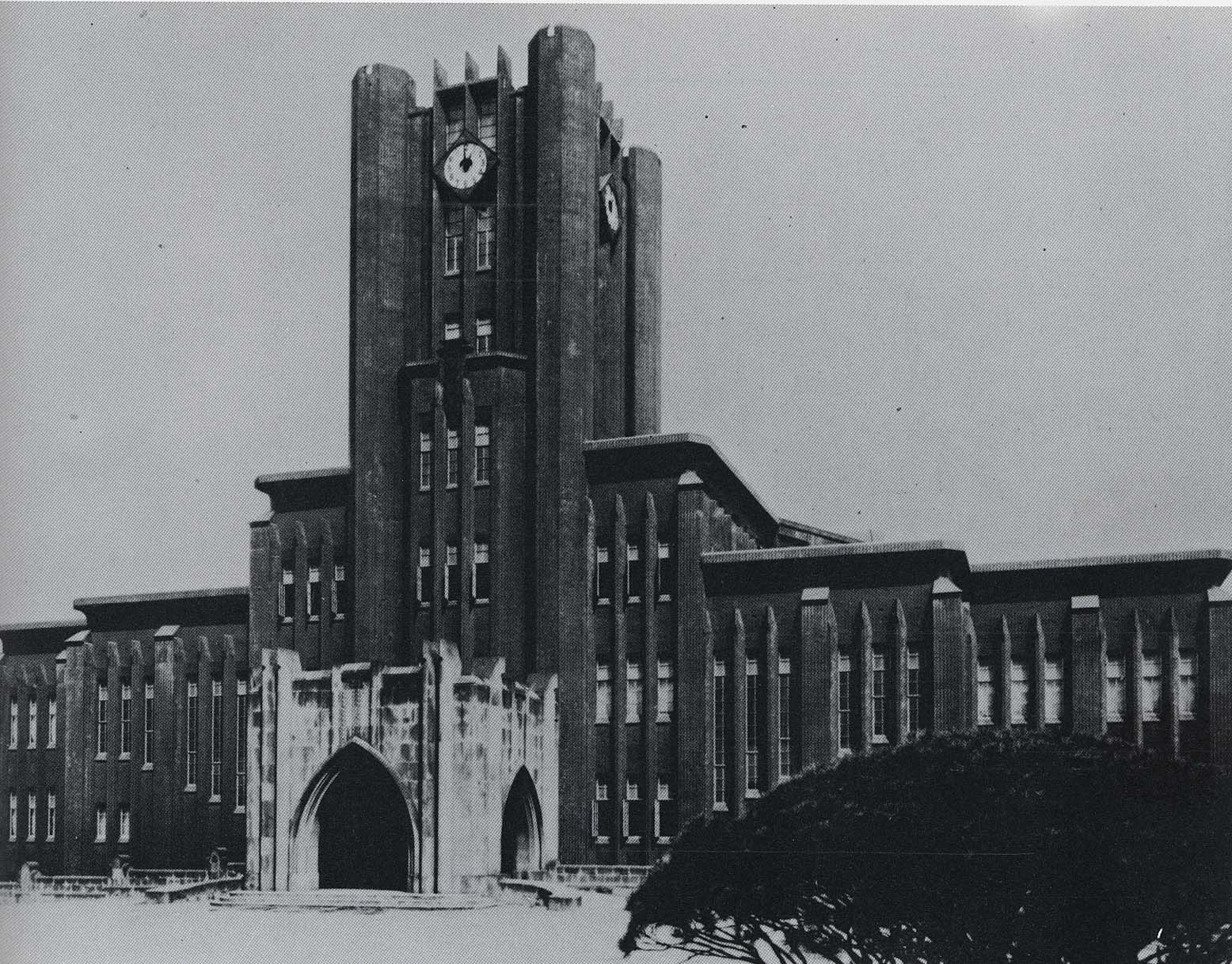 新築当時の東京帝大大講堂（安田講堂）